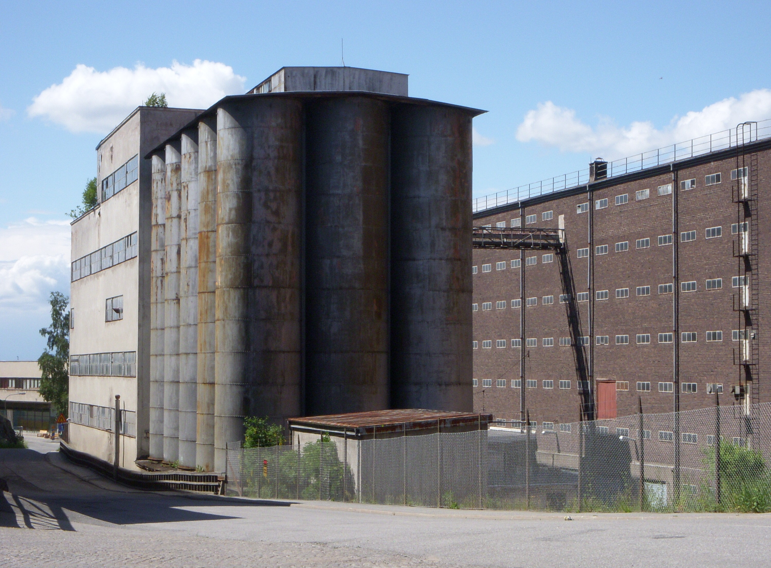 Kvarnholmens övergivna fabriksbyggnader